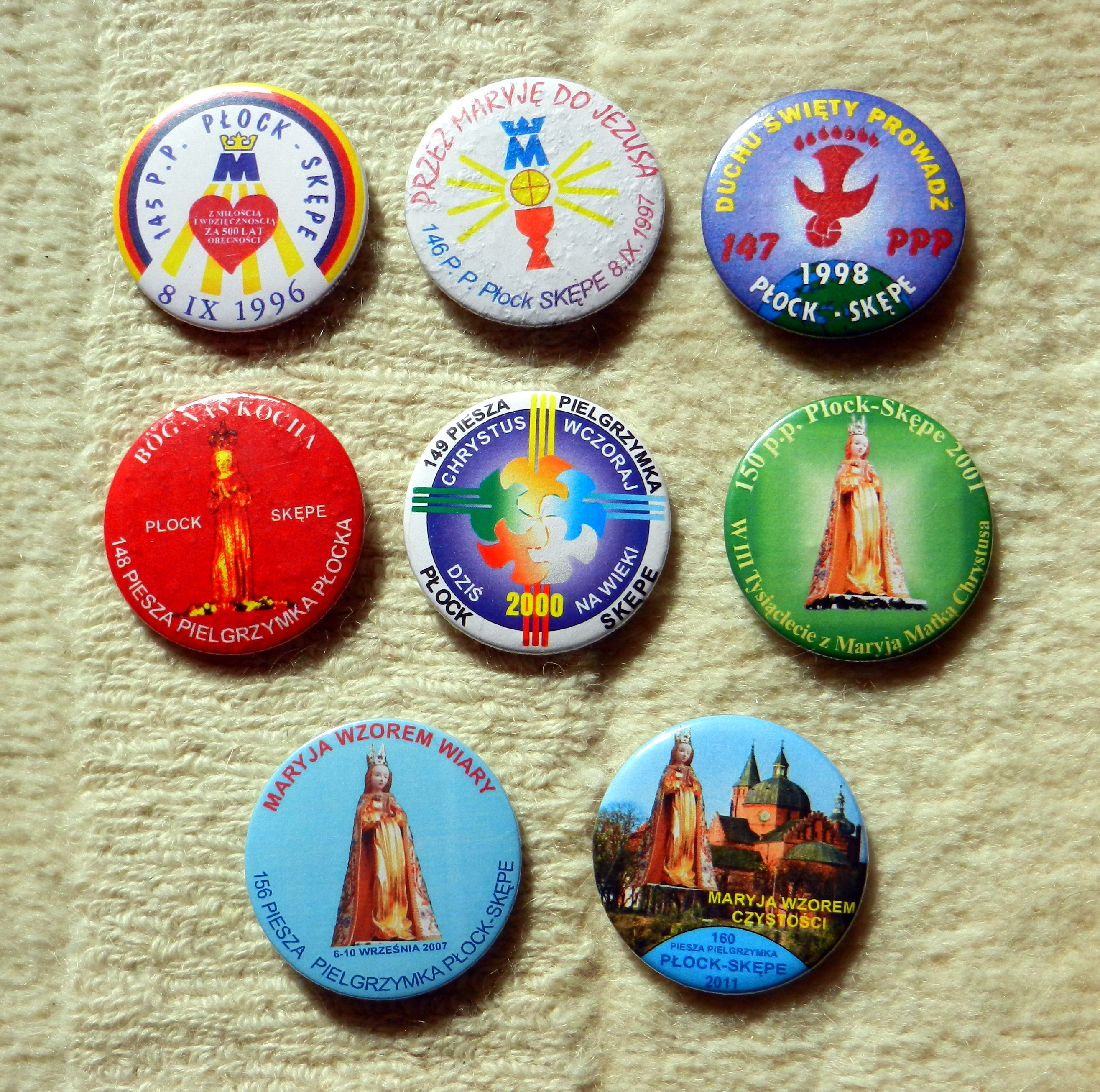 Emblematy pielgrzymkowe.